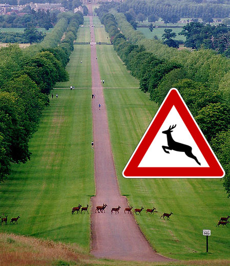 Straße Wildwechsel